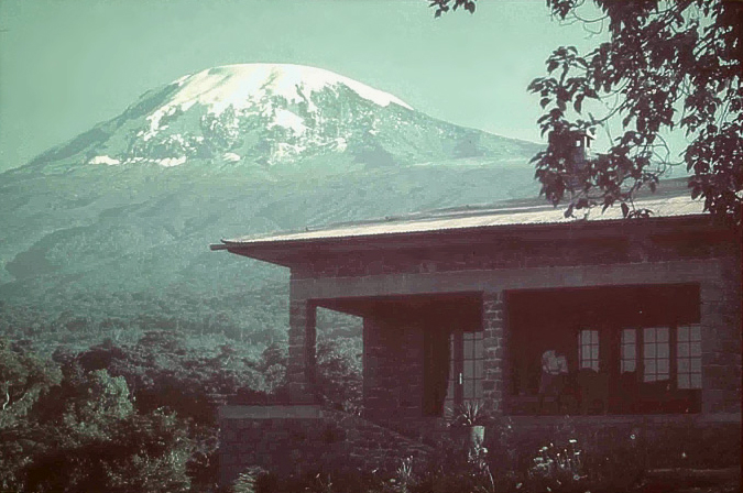 keine Lizenz Crux ふ 00:03, 30. Jan 2005 (CET) Kilimandscharo Contents 1 Summary 2 Summary 3 Licensing 4 Original upload log Summary Text auf der Hülle:Diaserie Blenck 1939 / 3.3.1. Naturraum / Landschaften Format Bildträger:Kleinbild formale Bemerkung:Keinbildfilm-Dias. Kodak. Entstehungsjahr:1939 Photograph:Blenck Region: Afrika , Ostafrika , Tansania , Kilimanjaro (?)/ Afrika , Deutsch Afrika , DOA Kommentar Inhalt:Reisebericht in: Blenck, Helmut u. Blenck, Erna: Afrika in Farben. München, Fichte-Verlag 1941. Kodak- Originale, Agfa Kopien. Teile in "Afrika in Farben." Summary Der Bildbestand der Deutschen Kolonialgesellschaft in der Stadt- und Universitätsbibliothek Frankfurt am Main [1] Einige der vom Kolonialen Bildarchiv in Frankfurt a. Main [2] veröffentlichten Bilder wurden von Mitarbeitern des Bildarchivs nachbearbeitet oder dort erstveröffentlicht. Eine Weiterverwendung ist unter der Auflage einer deutlichen Quellenangabe gestattet.